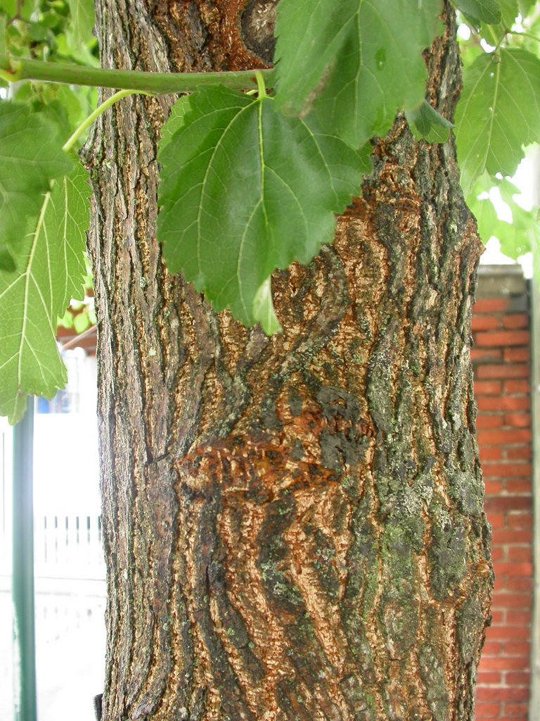 Morus alba bark and leave - Ecorce et feuille de mûrier blanc